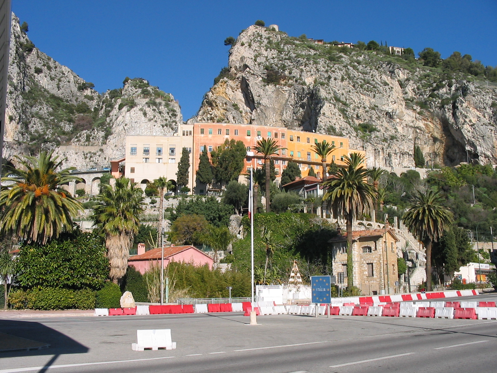 Poste frontière franco-italien à Menton (Alpes-Maritimes). Je suis l'auteur du cliché pris en janvier 2006